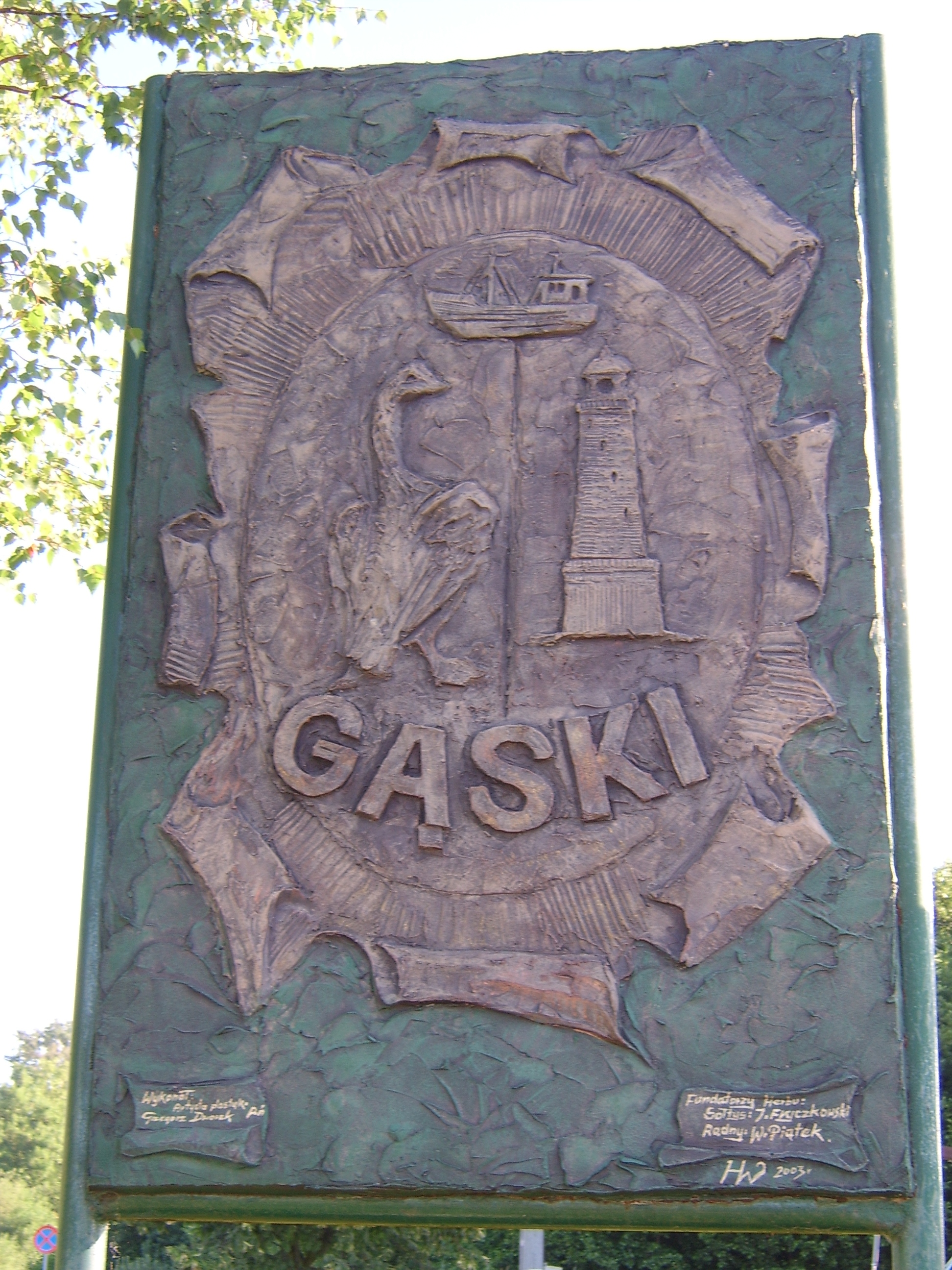 Herb wsi Gąski w gminie Mielno / Coat of arms of Gąski